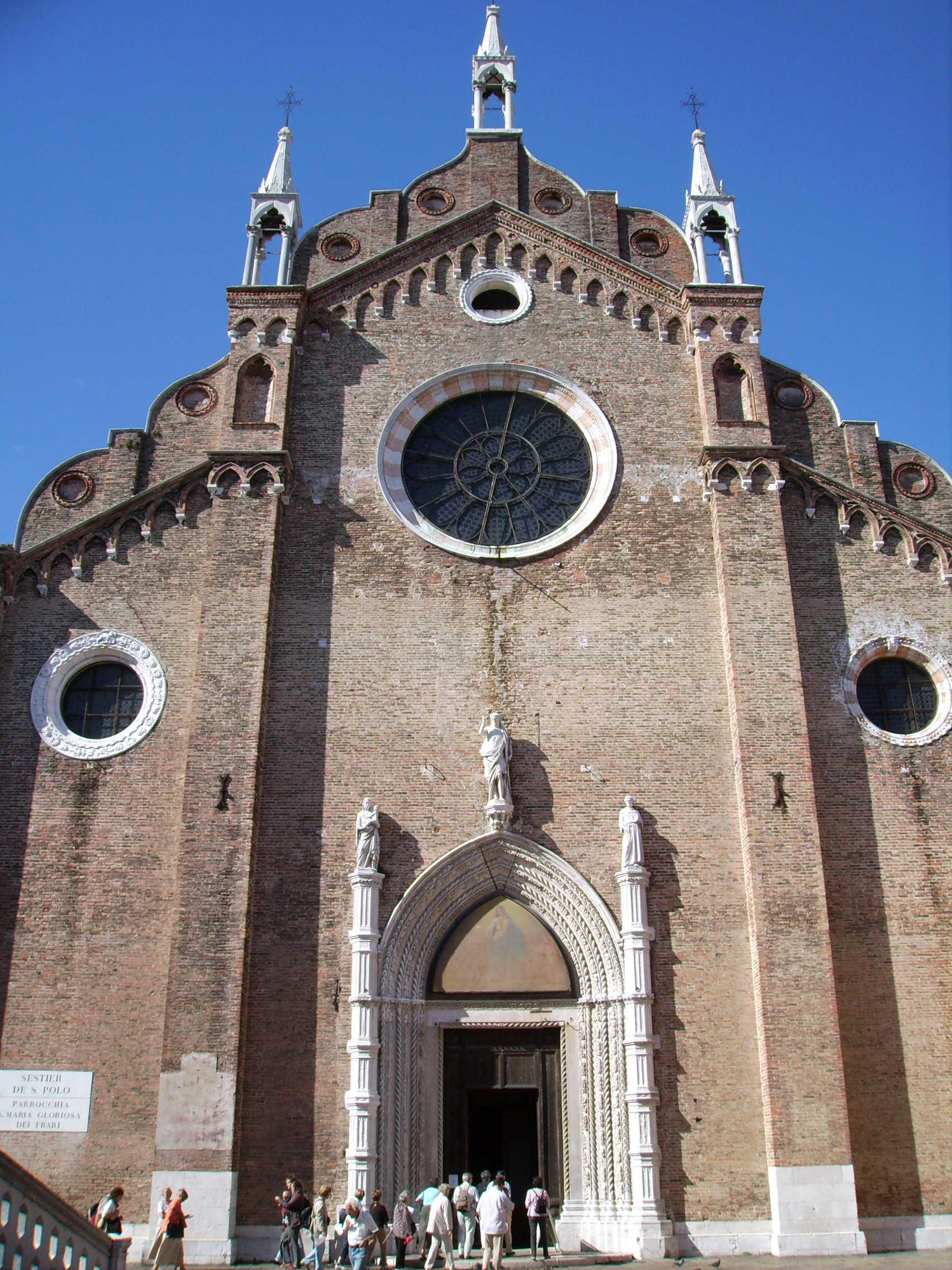 Santa Maria Gloriosa dei Frari in Venezia